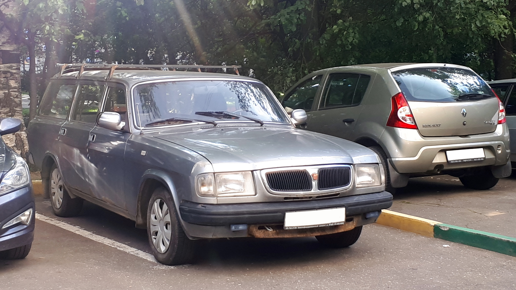 ГАЗ-310221.